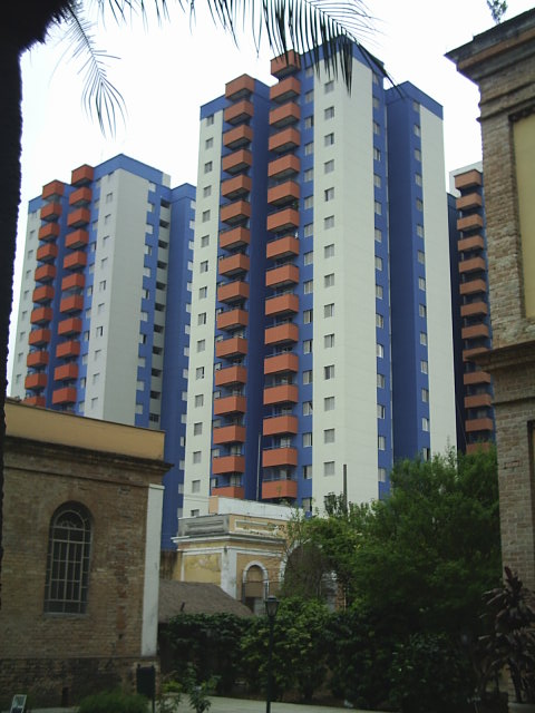 Contraste entre o antigo e o novo na Mooca, São Paulo.